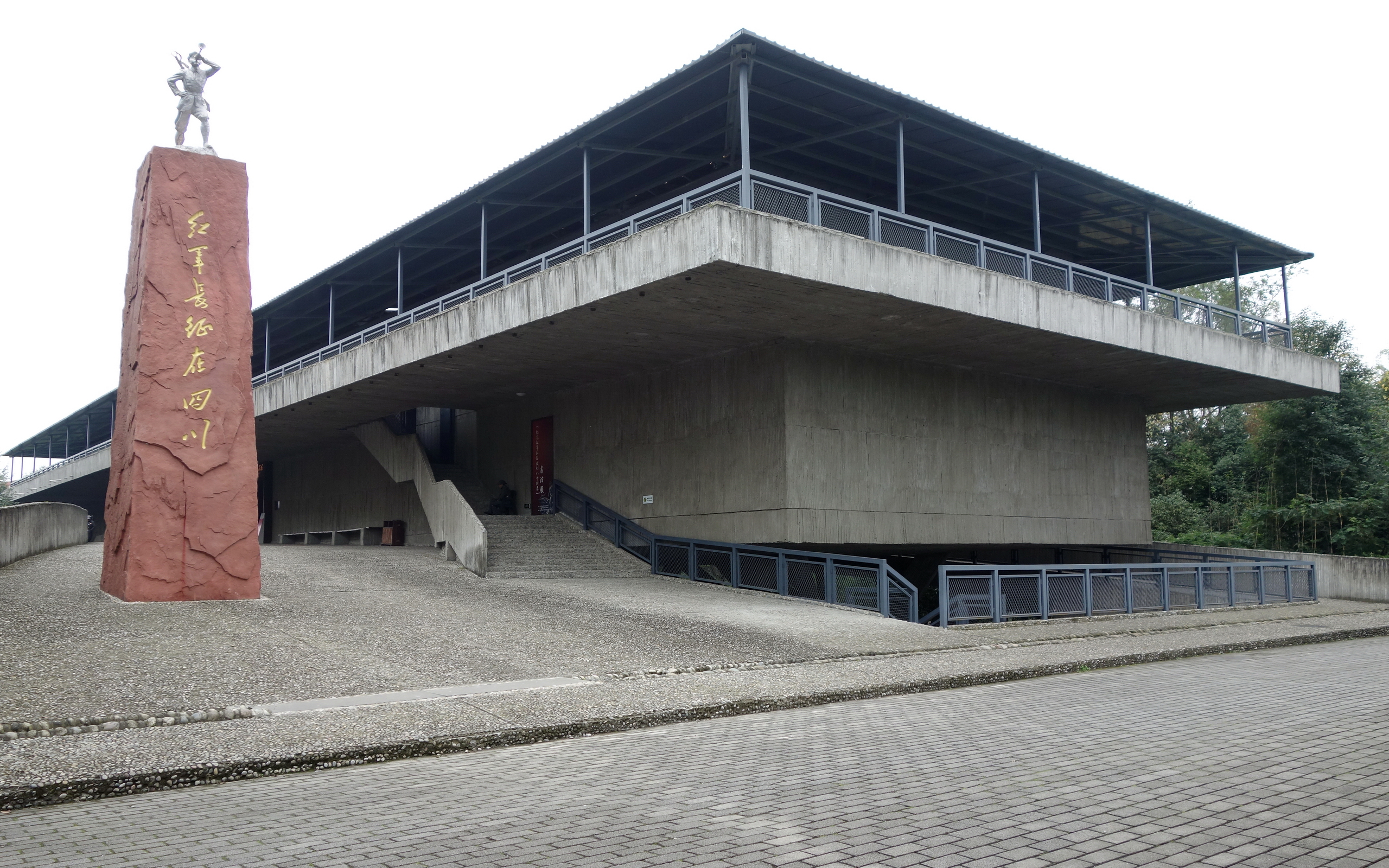 建川博物馆聚落红军长征在四川纪念馆，纪念红军长征在四川走过的征途。